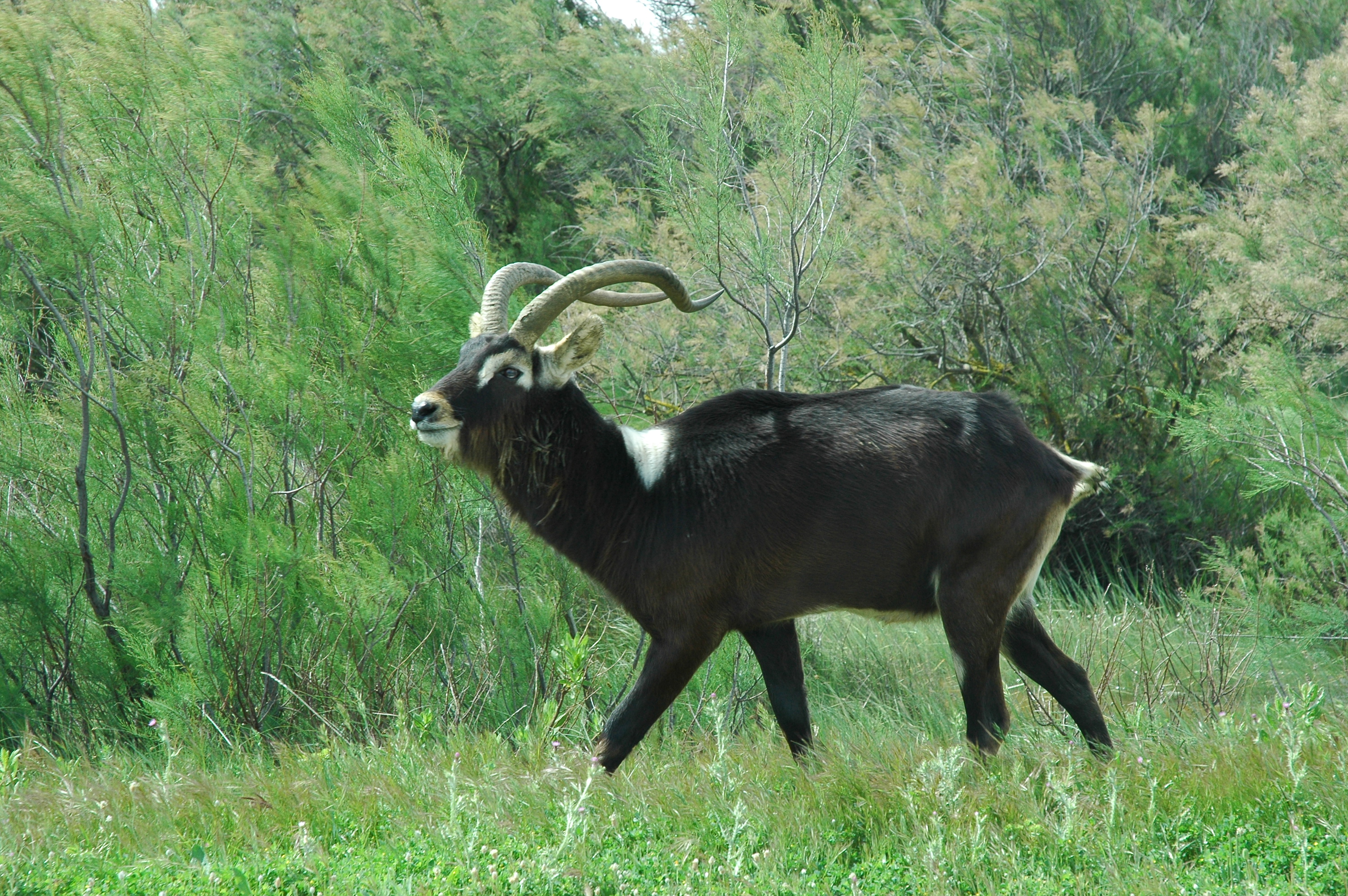 Cobe de Mrs Gray dans la Réserve de Sigean.